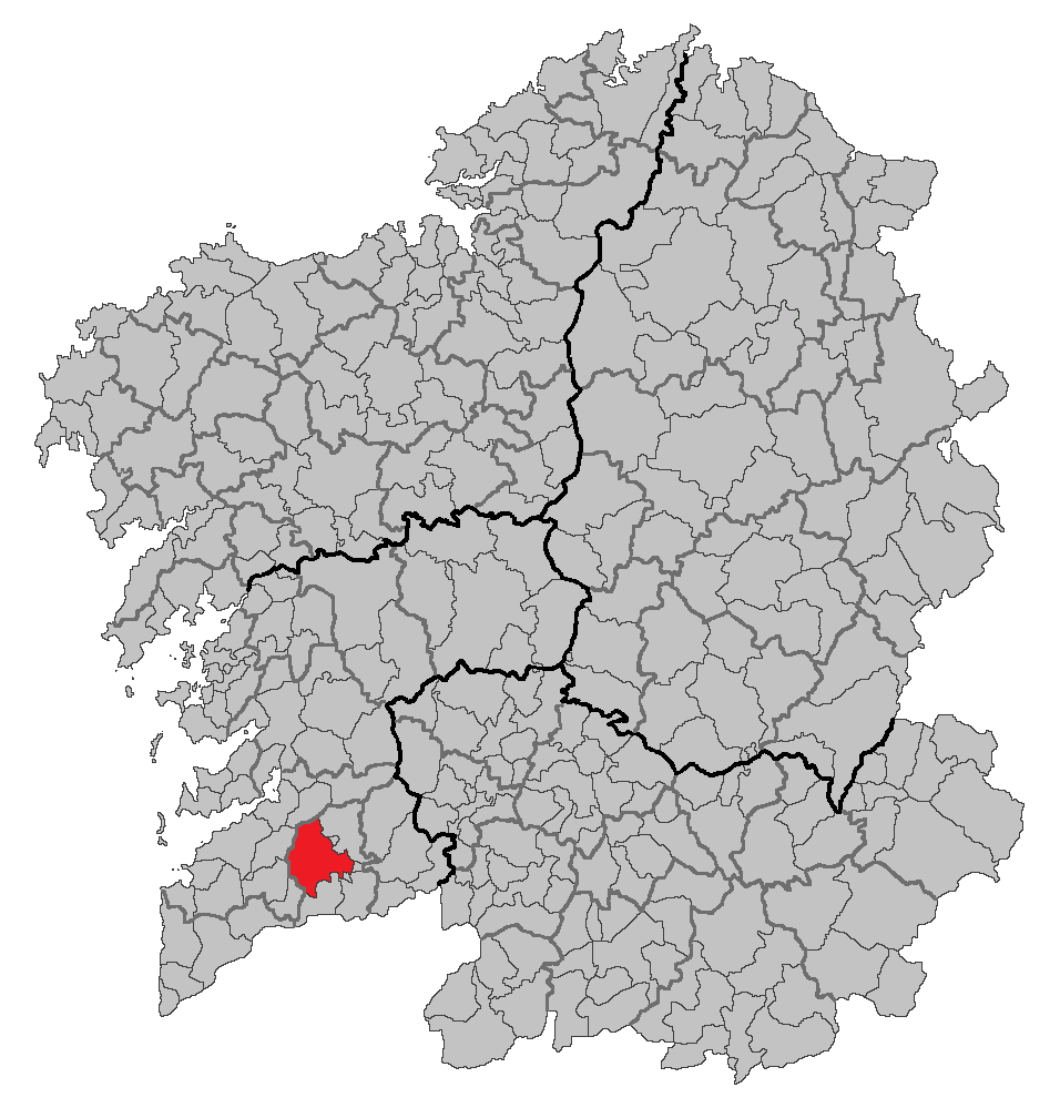 Mapa coa localización do concello de Ponteareas.